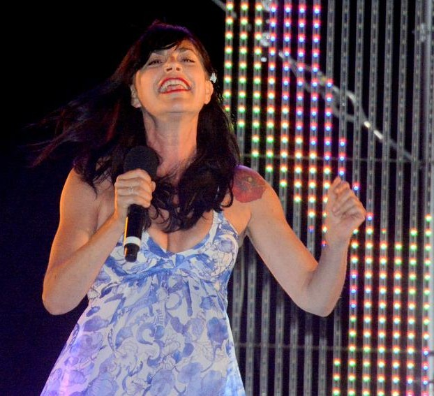 Lio au concert "La Folie des années 80" à Enghien-les-Bains